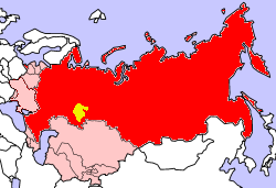 Мапа Радянської Башкирії